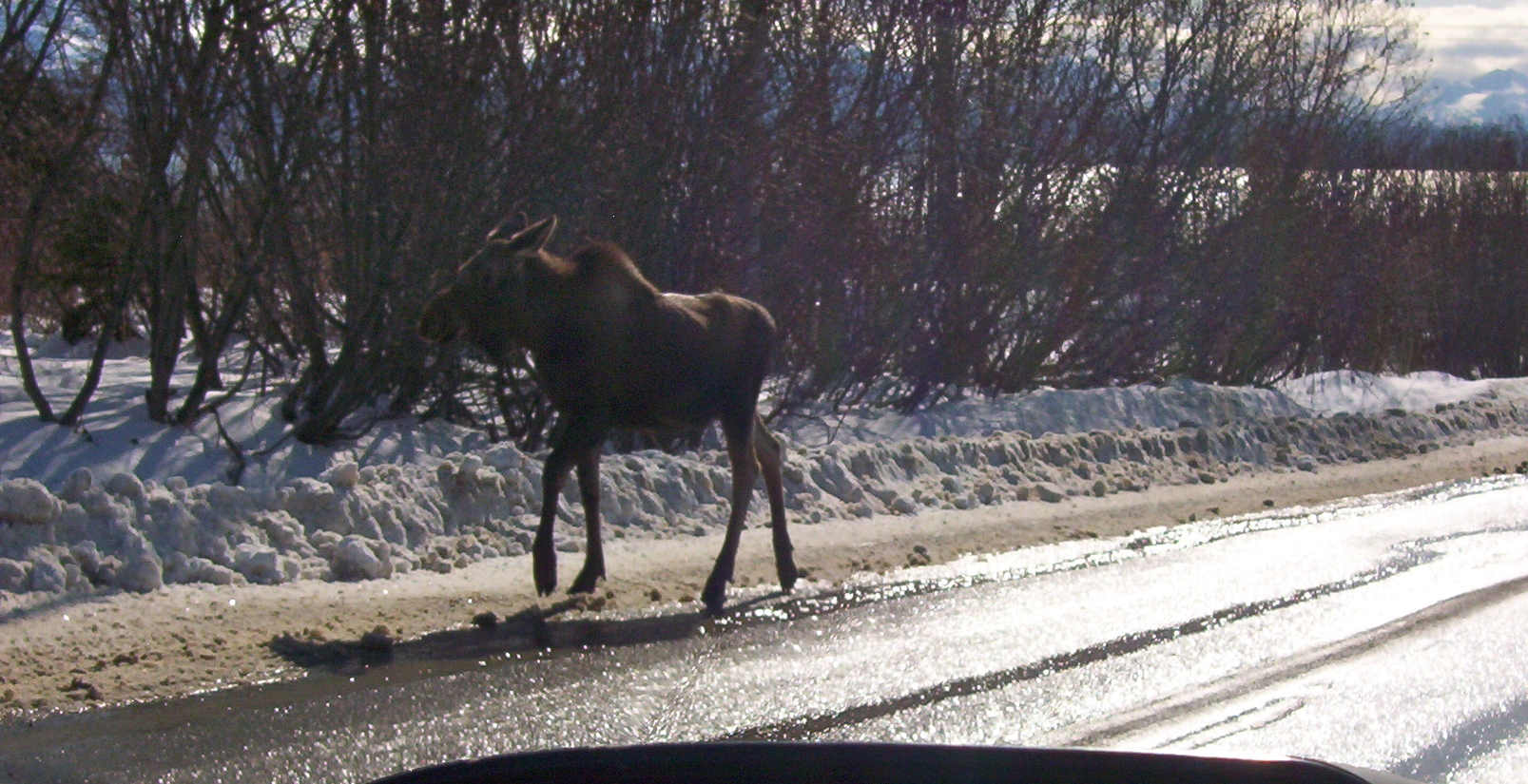 moose running up Main Street, Homer,Alaska